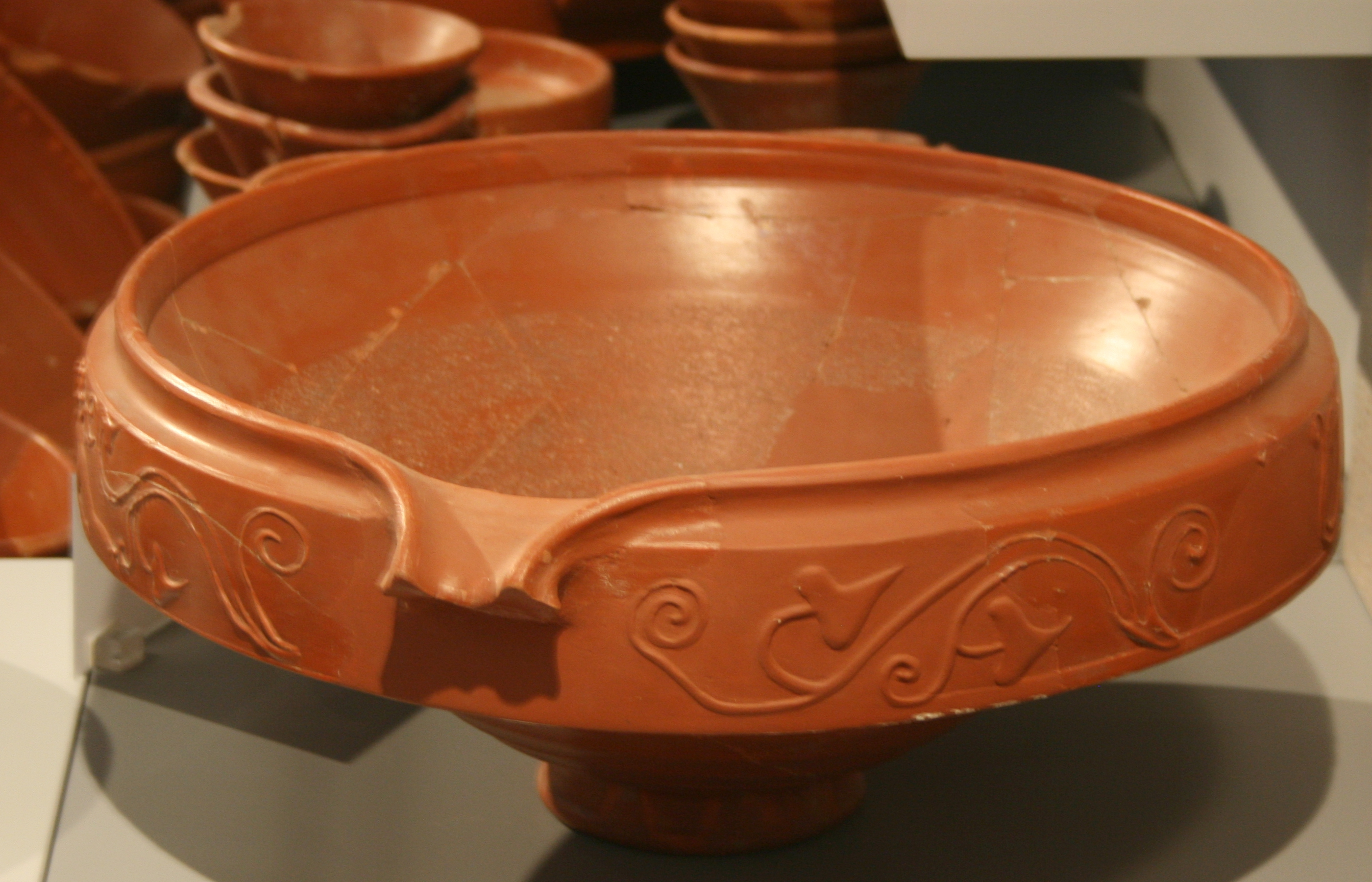 Terra Sigillata-Reibschüssel Form Drag. 43 mit Barbotine-Verzierung auf dem Kragen im Museum Rheinzabern.